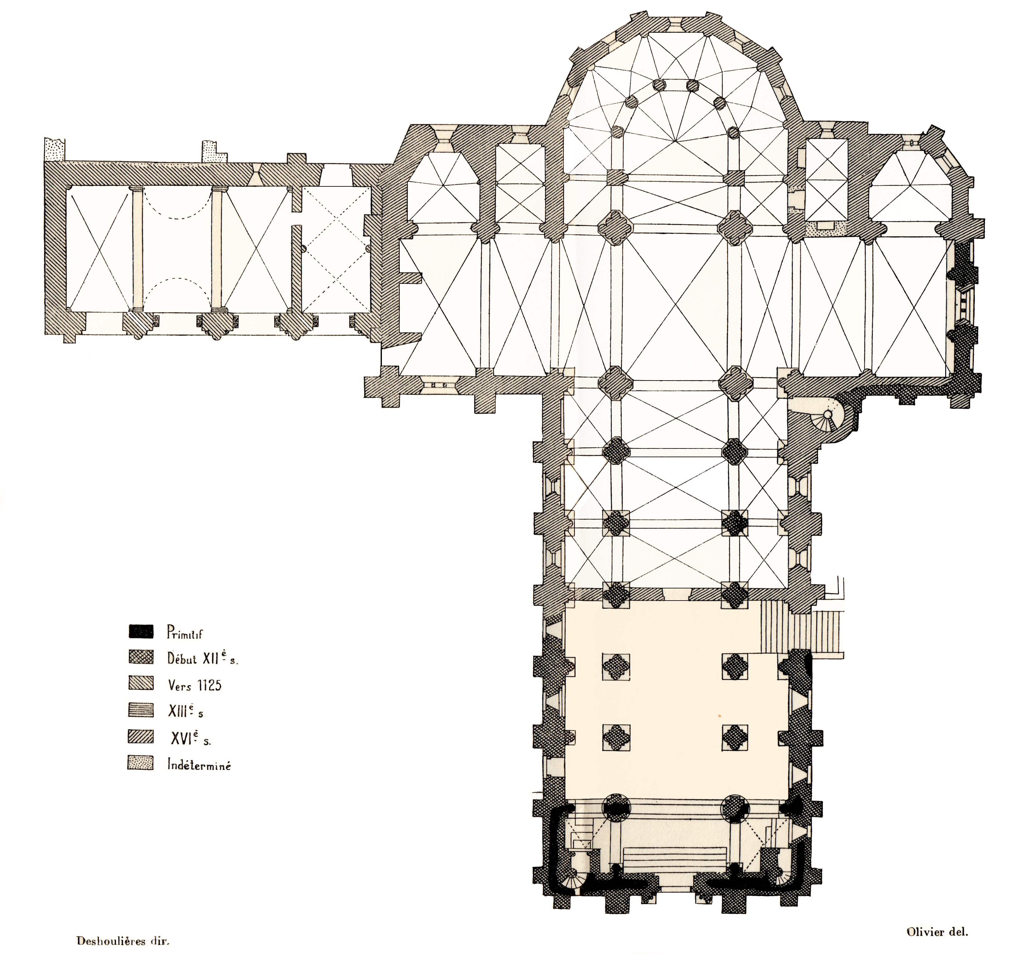 Marcilhac-sur-Célé - Abbaye Saint-Pierre - Plan (Congrès archéologique de France - 1937)